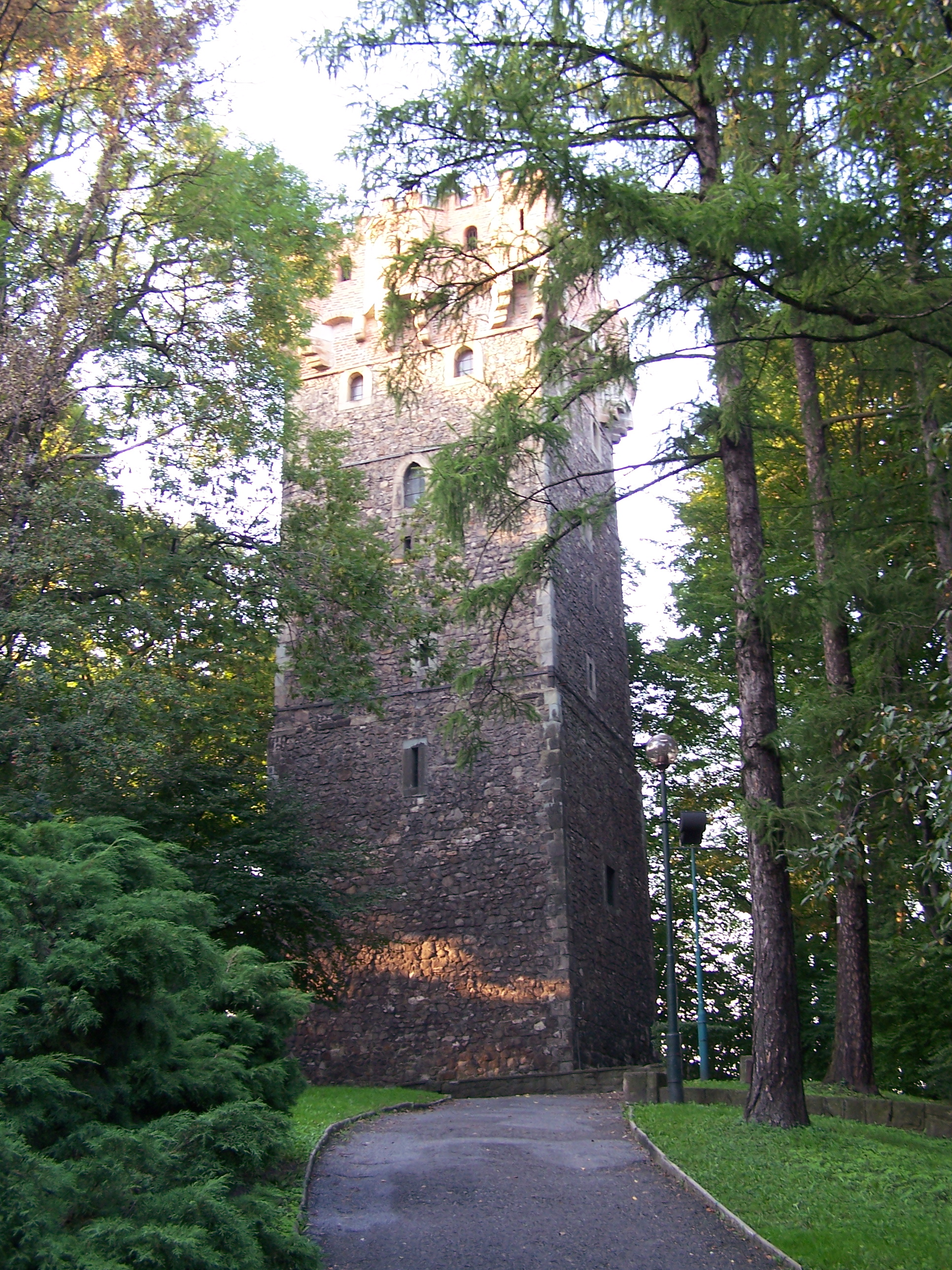 Piast Tower (Wieża Piastowska) in Cieszyn, Poland